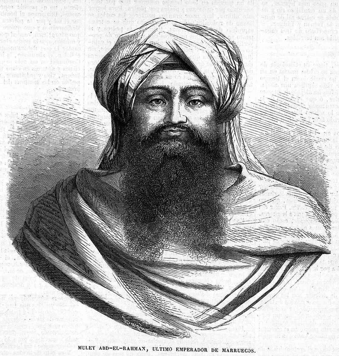 Muley Abd-el-Rahman, en la revista española El Museo Universal.